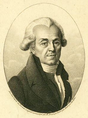 French geologist Barthélemy Faujas de Saint-Fond (1741-1819)